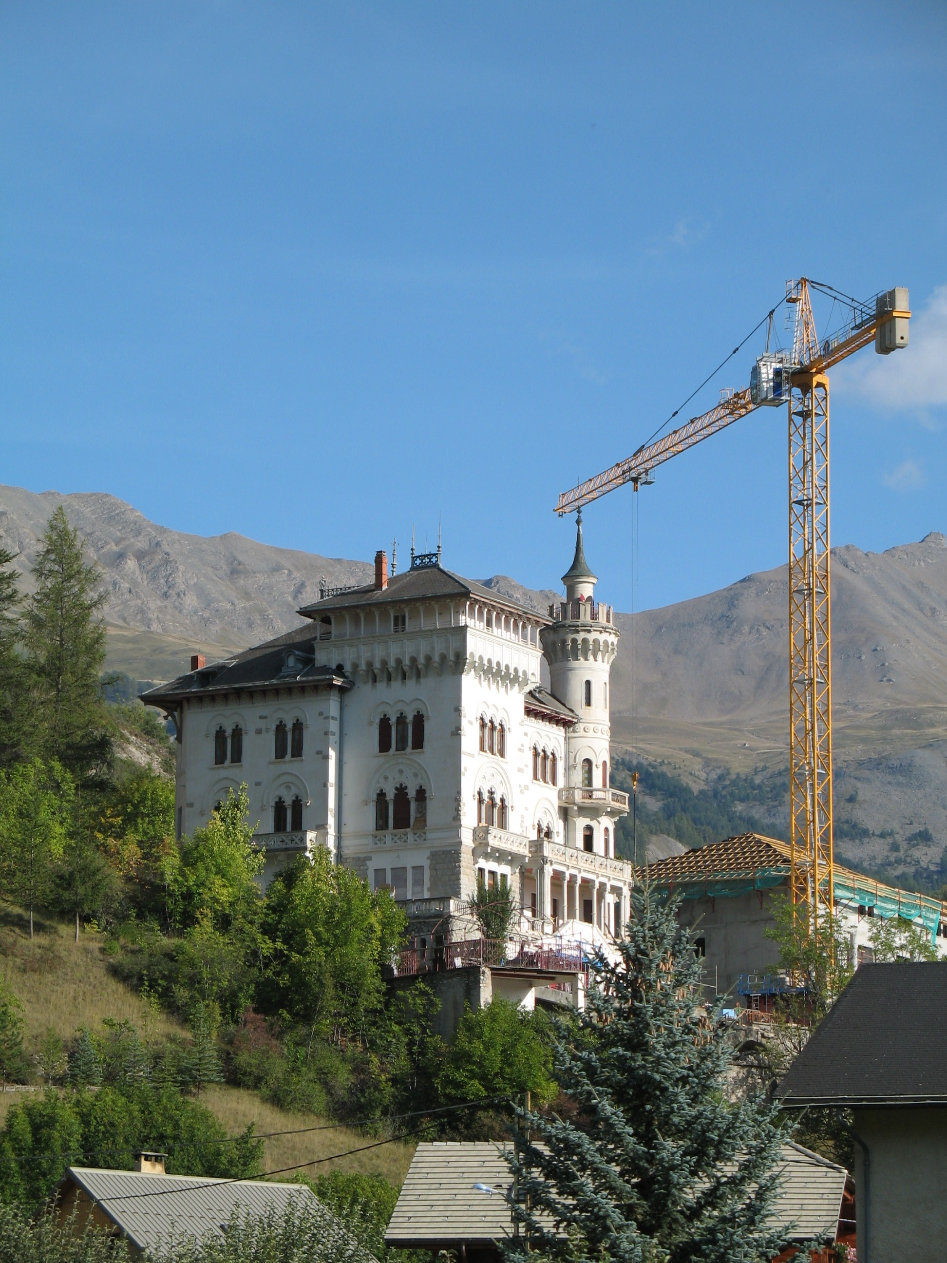 Jausiers, département des Alpes-de-Haute-Provence, France Le chateau